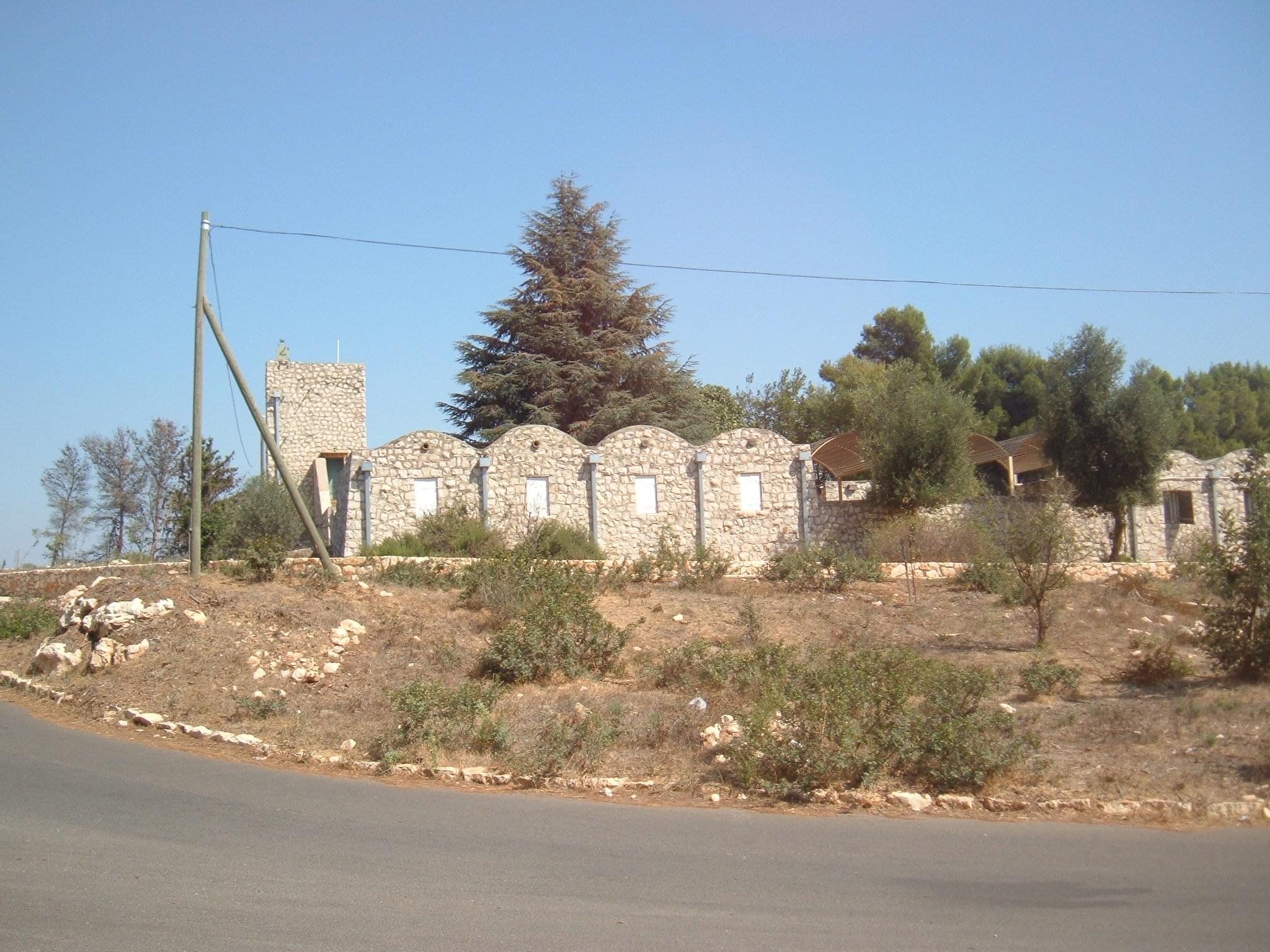 birya fortress general outlook. מראה כללי של מצודת ביריה